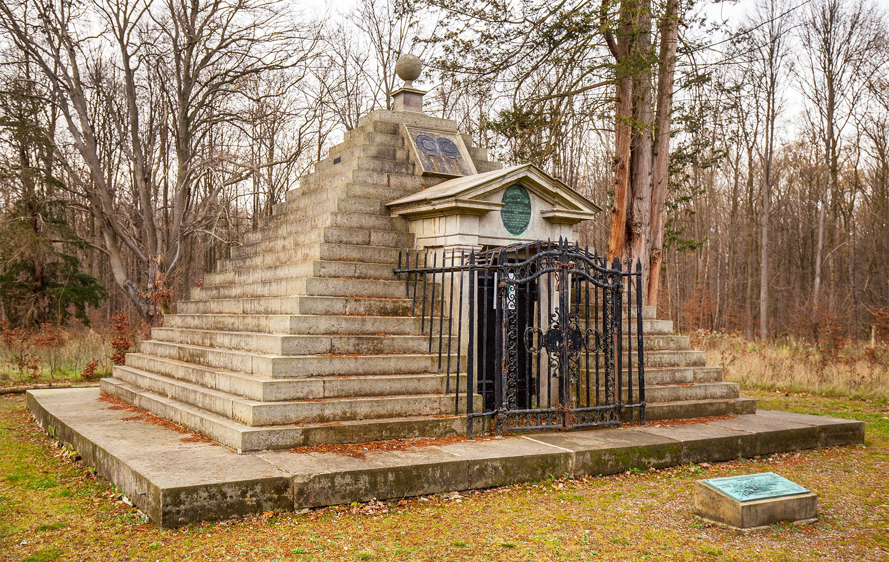 Mausoleum von Graf Wilhelm Friedrich Ernst zu Schaumburg-Lippe und Familie im Schaumburger Wald.